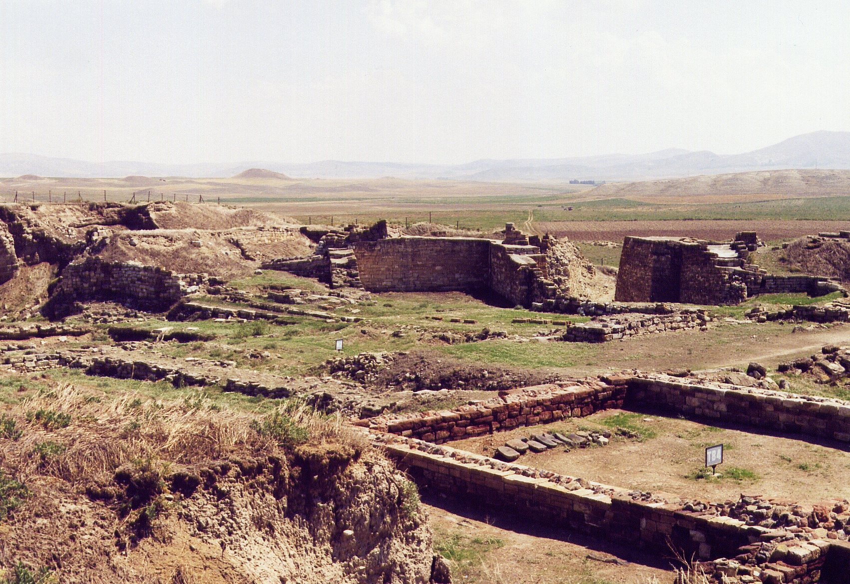 Inneres der Akropolis von Gordion mit phrygischem Stadttor, Zentraltürkei